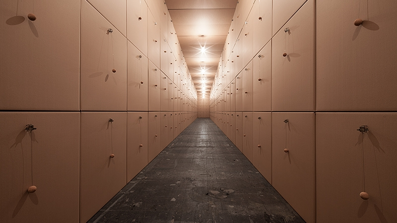 318 prepared dc-motors, cork balls, cardboard boxes 100x100x100cm⎢Zimoun 2013. Installation view: Opernwerkstätten Berlin, Germany.